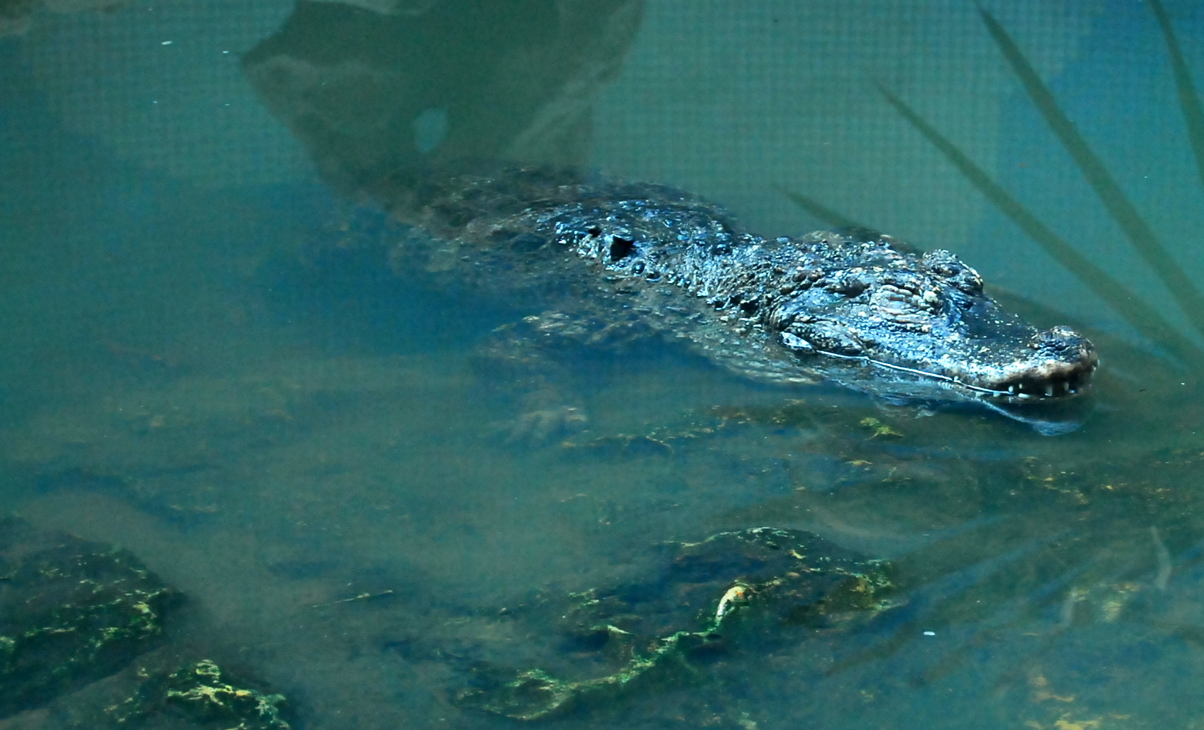 北京动物园中的扬子鳄